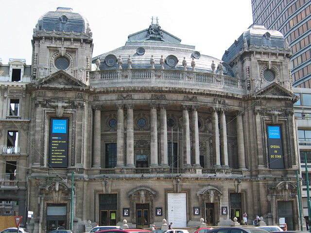 Opera-gebouw aan de Leien in Antwerpen